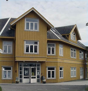 Nils Aas kunstverksted. Art Gallery, Inderøy, Norway. Entrance